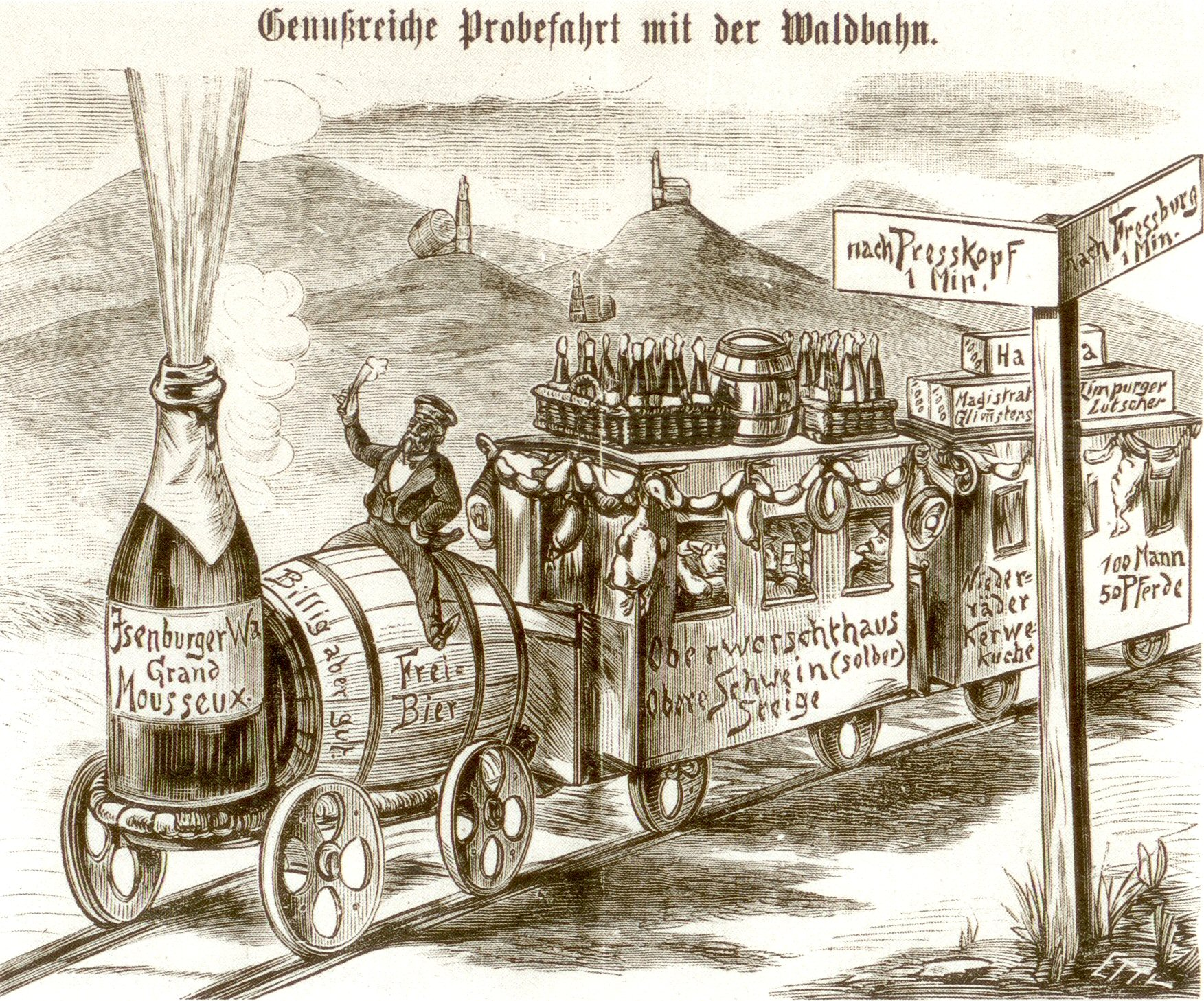 Karikatur aus der Frankfurter Latern vom 9. Februar 1889 zur Probefahrt der Frankfurter Waldbahn.„Genußreiche Probefahrt mit der Waldbahn“(Schildbeschriftung: „nach Presskopf 1 Min.; nach Fressburg 1 Min.“)